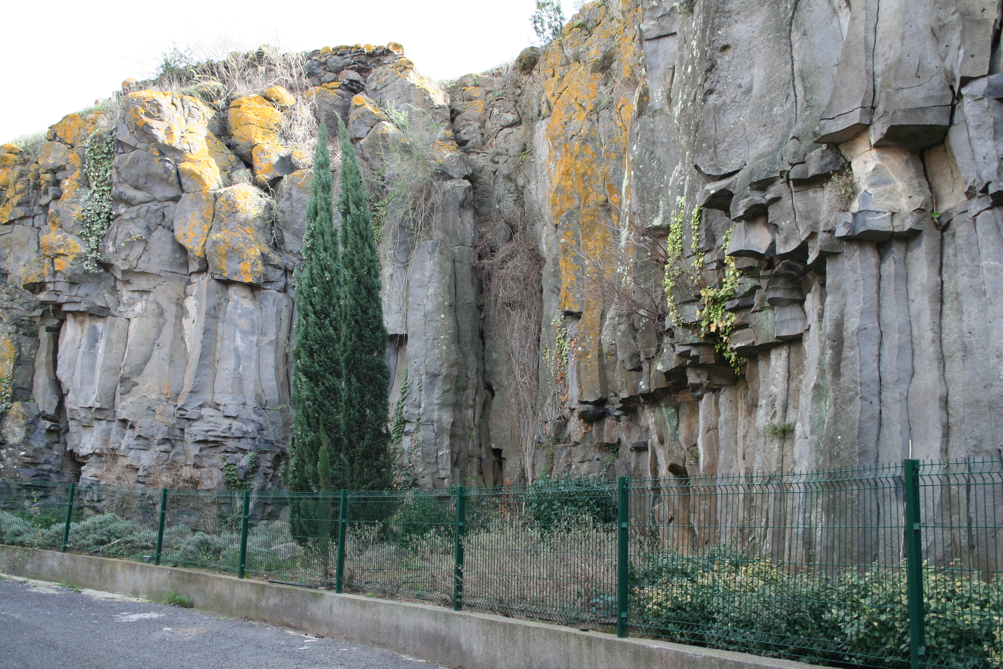 Saint-Thibéry (Hérault) - orgues basaltiques (ancienne coulée de lave).